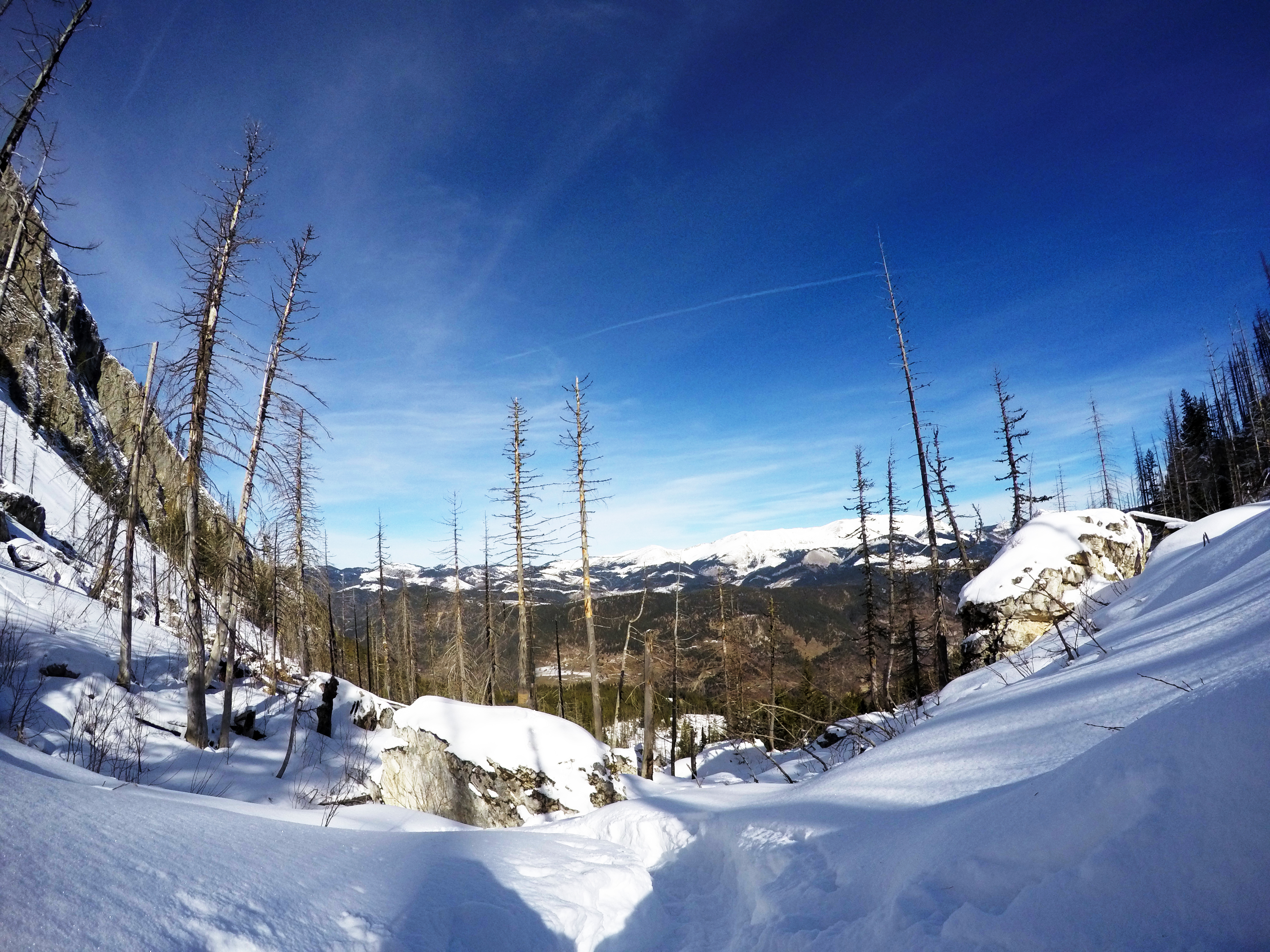 Parku Kombëtar Bjeshkët Nemuna, Pejë, Deçan, Istog, Junik, Gjakovë